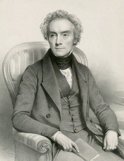 Archibald Billing